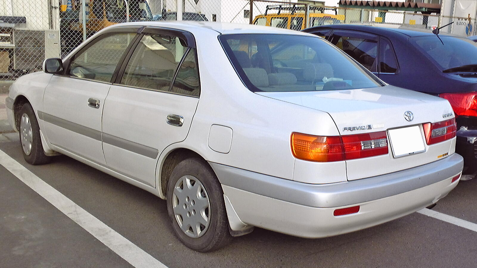 トヨタ・コロナプレミオ（後期型・リア）